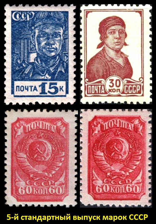 Марки пятого стандартного выпуска поступили в обращение в марте—августе 1939 года. Было эмиттировано три номинала: 15, 30 и 60 копеек, перфорированы: комбинированная гребенчатая зубцовка 12:12½ (на каждые 2 сантиметра края марки приходится 12:12½ зубцов). Для марки номиналом в 30 копеек использовали рисунок Дмитрия Голядкина предыдущего (4-го) выпуска (работница), остальные марки оригинальных рисунков — рабочий-сталевар (рисунок был создан коллективом художников Гознака) и герб СССР (художник Н. Темноруков). Марка номиналом в 60 копеек была отпечатана глубокой печатью, остальные — типографской на обыкновенной бумаге без водяных знаков, с зубцами. Марка Герб СССР, растр ВР, ярко-розовая имеет разновидности по зубцовке: линейная 12½ и растру: ГР.